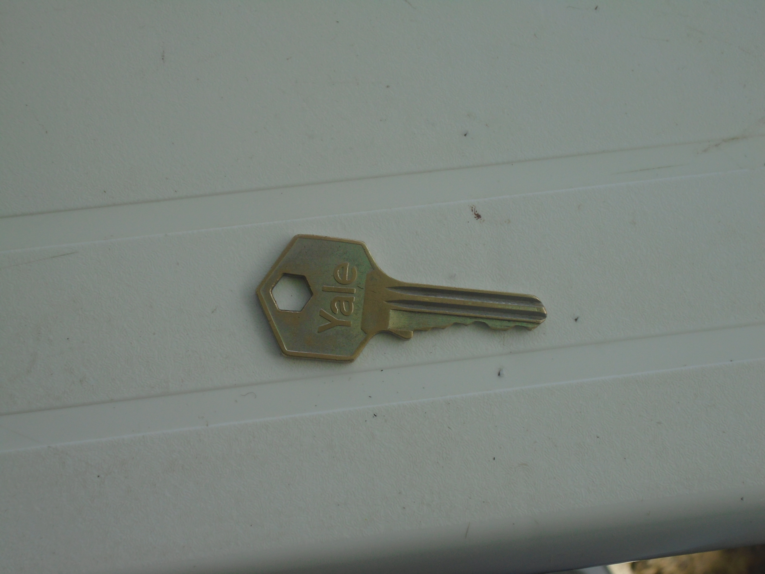 Una llave actual